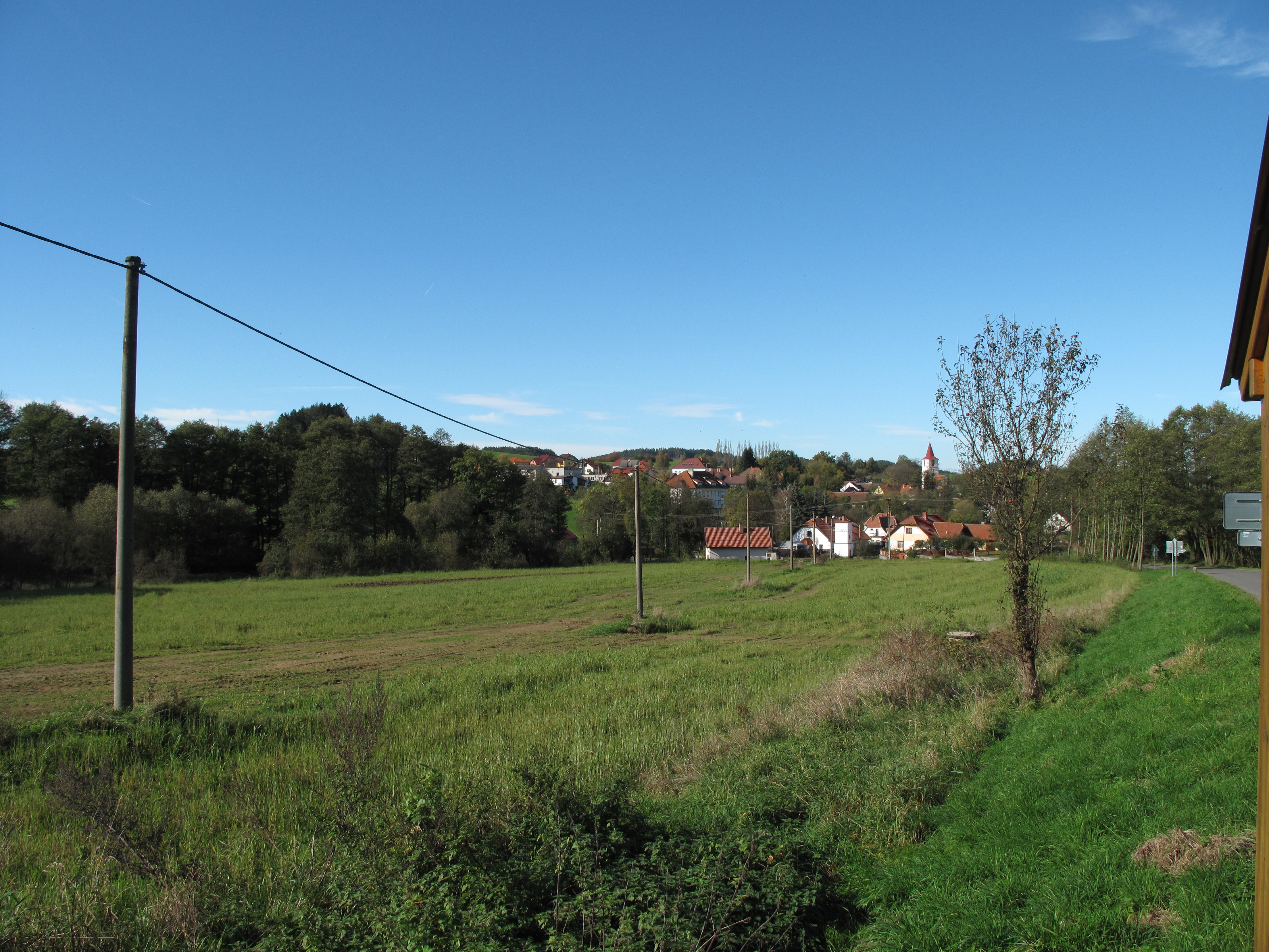 Nechvalice v pohledu od Libčic. Okres Příbram, Česká republika.